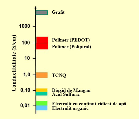 Conductibilitatea electrolitului